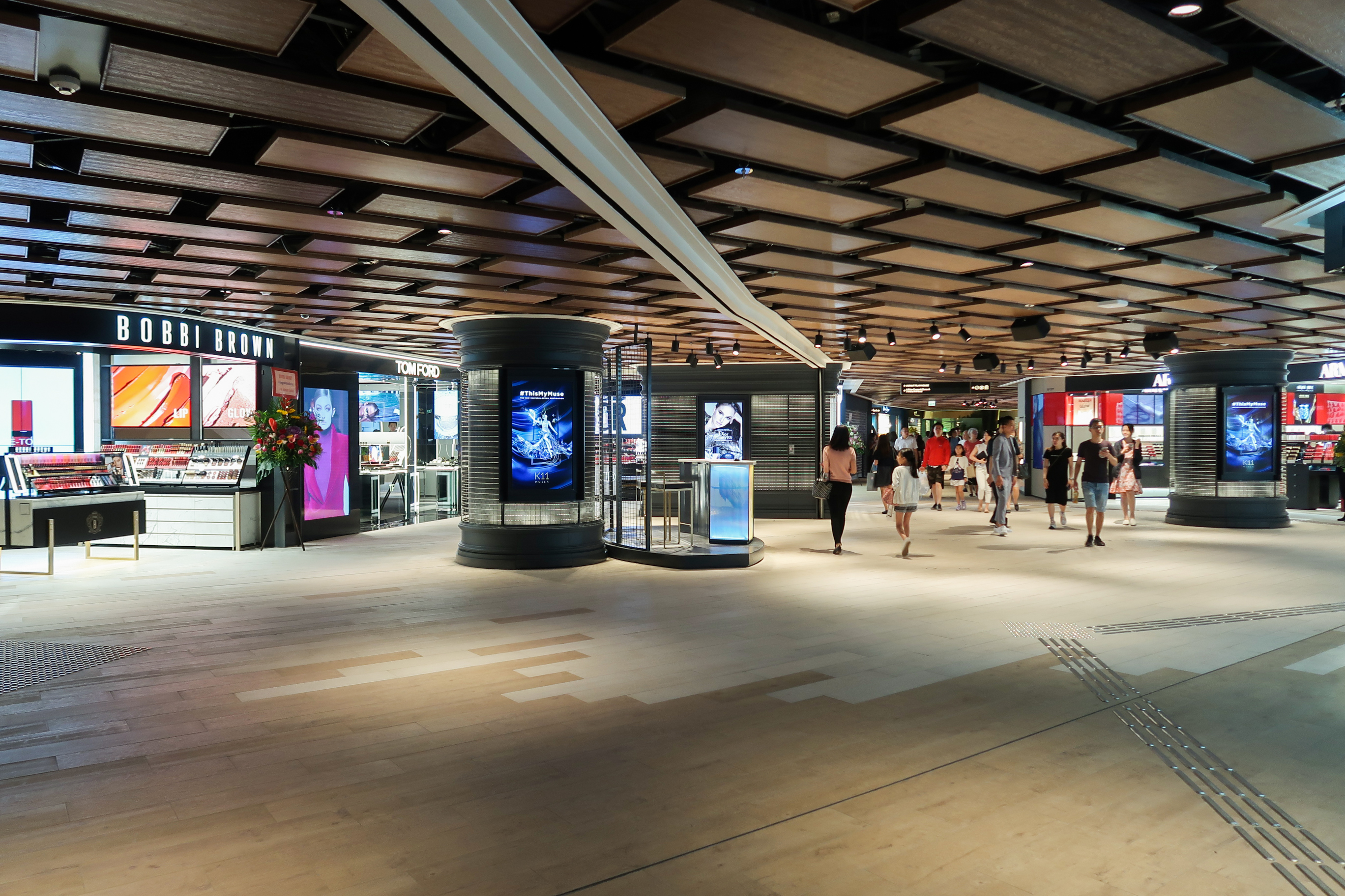 K11 MUSEA B1 BEAUTILICIOUS